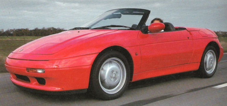 Bildbeschreibung:1992er Lotus Elan in Stuttgart Quelle:A.Wart (Benutzer; Enthusiast, eigenes Foto) Fotograf:A.Wart Datum:11.10.2002 Sonstiges:JPEG-Bild, Abmessungen; 775 x 365, 65kb Lizenz:Ich stimme der Public-Domain Lizenz zu und veröffentliche das Bild.